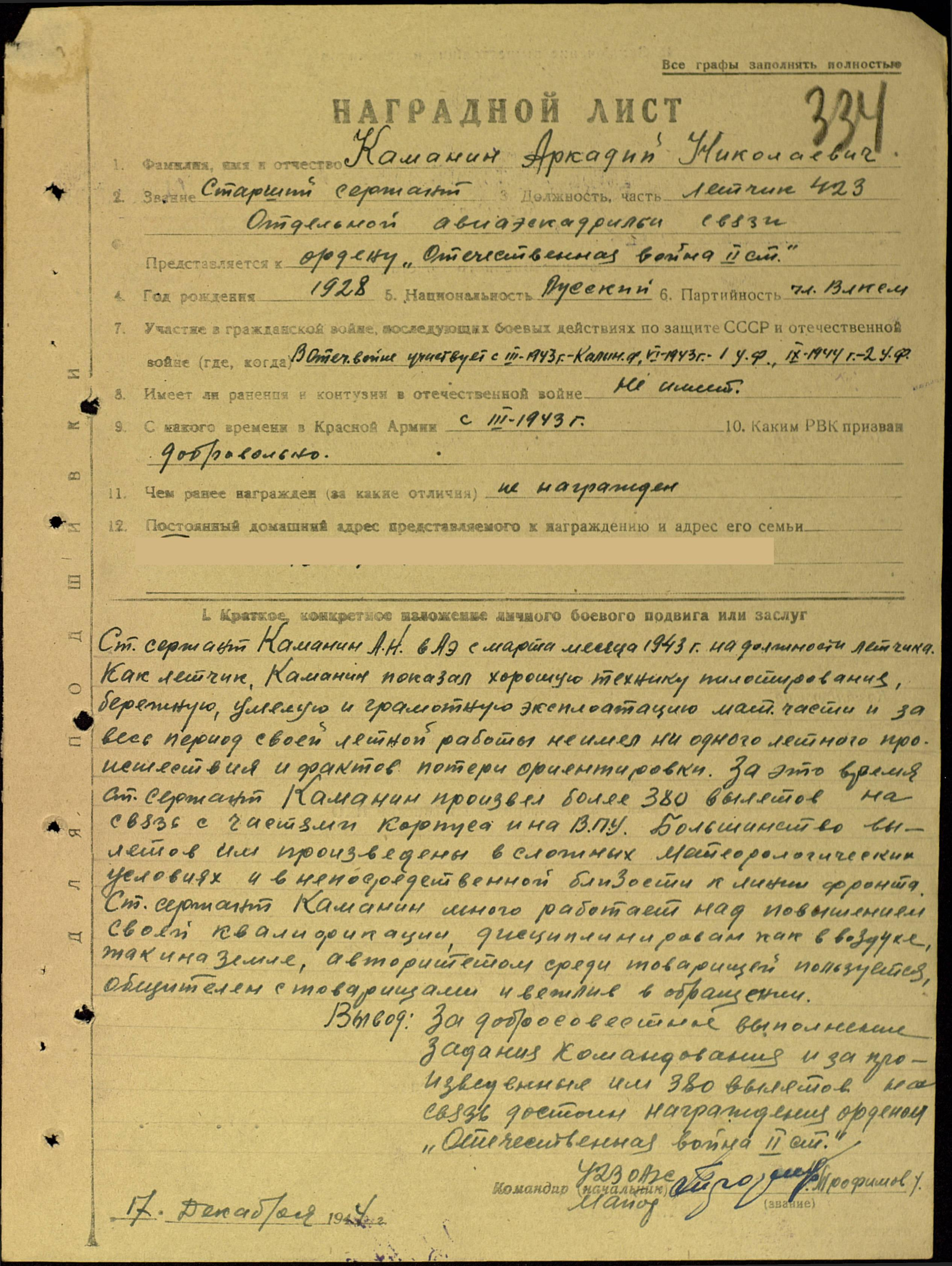 Наградной лист на представление к ордену "Отечественной войны II степени" на Каманина Аркадия Николаевича